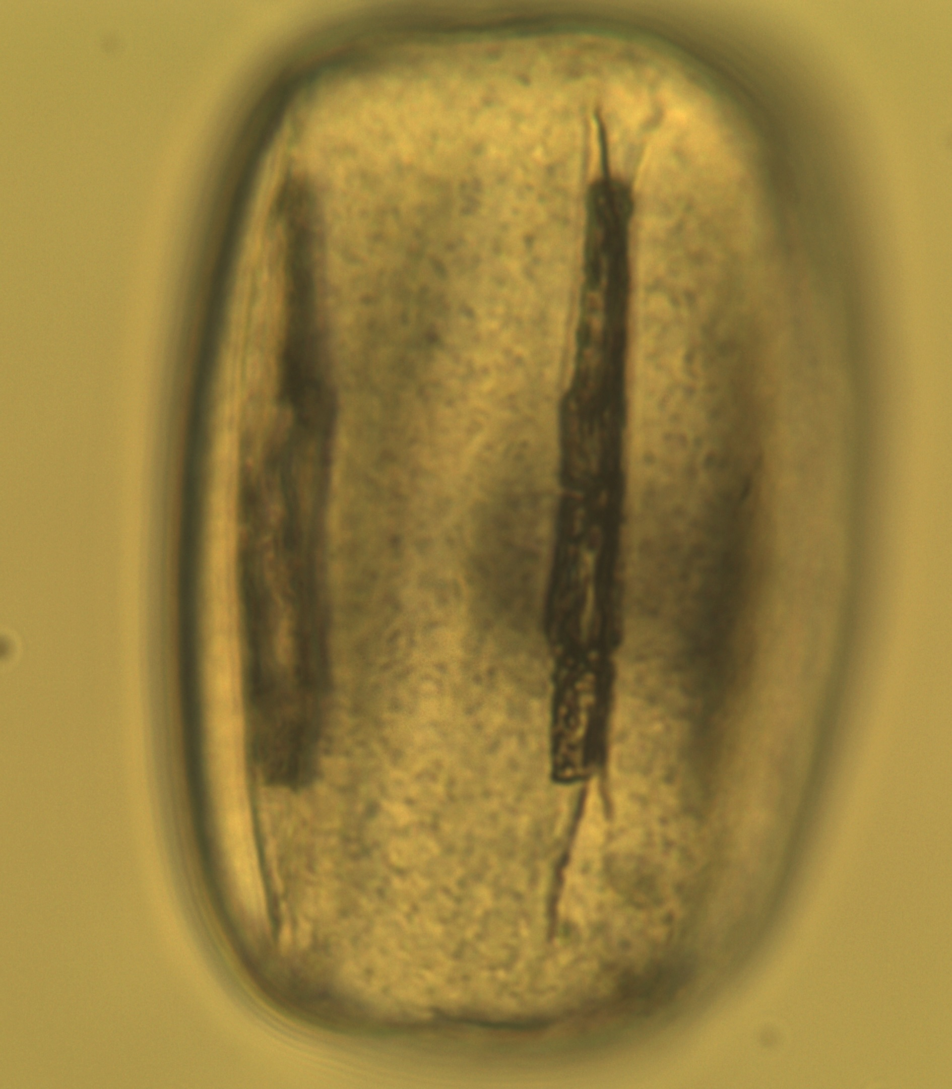 Viola willrockiana, Pollen, Lichtmikroskop 400x